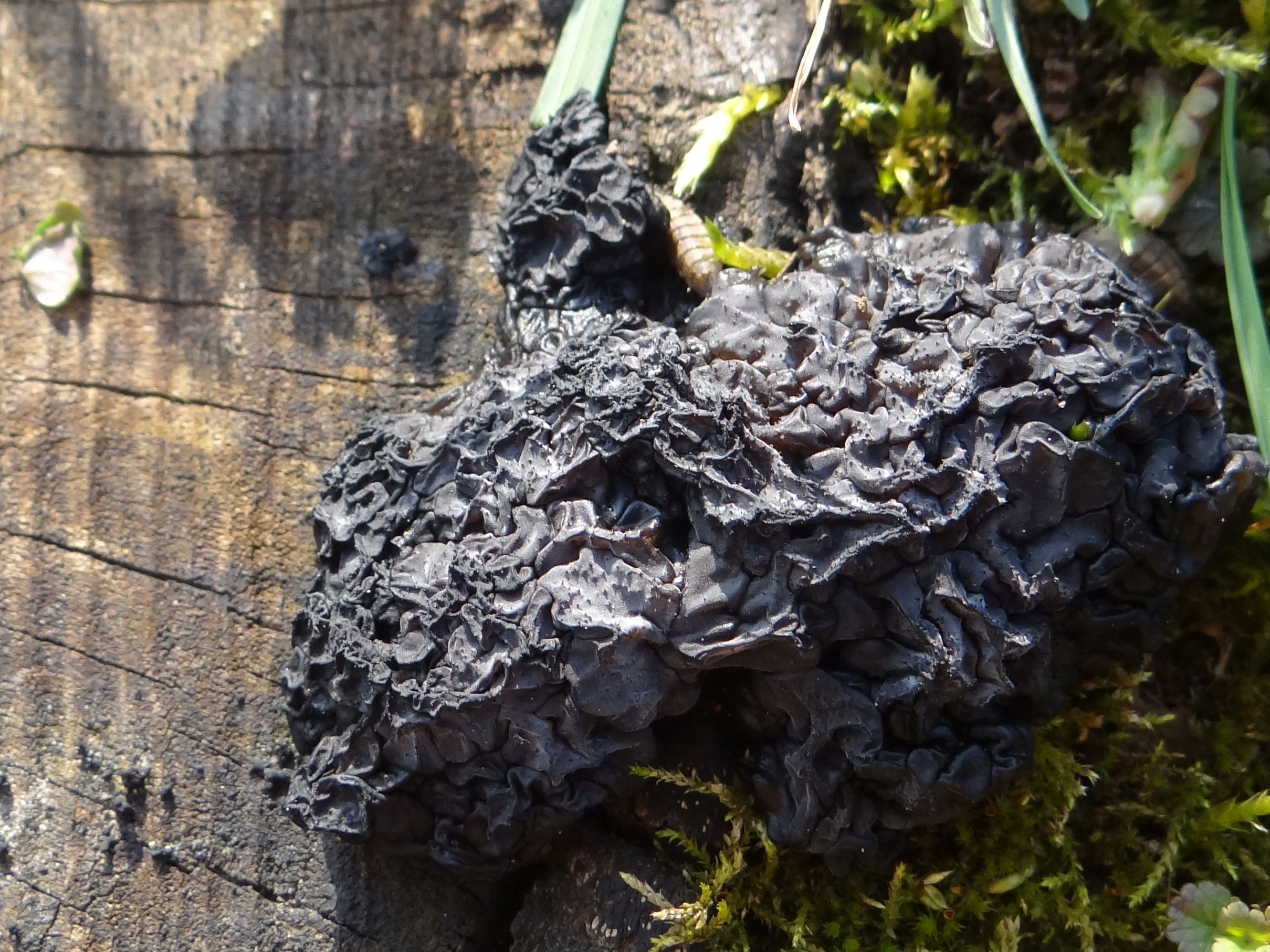 Exidia nigricans. Location: Poland, Pogórze Wiśnickie